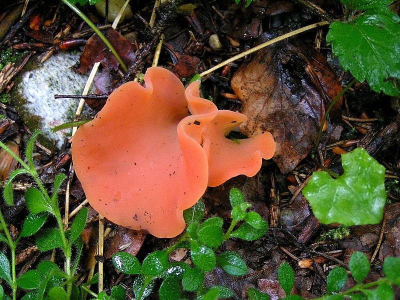 Guepinia helvelloides syn. Tremiscus helvelloides - Exidiaceae